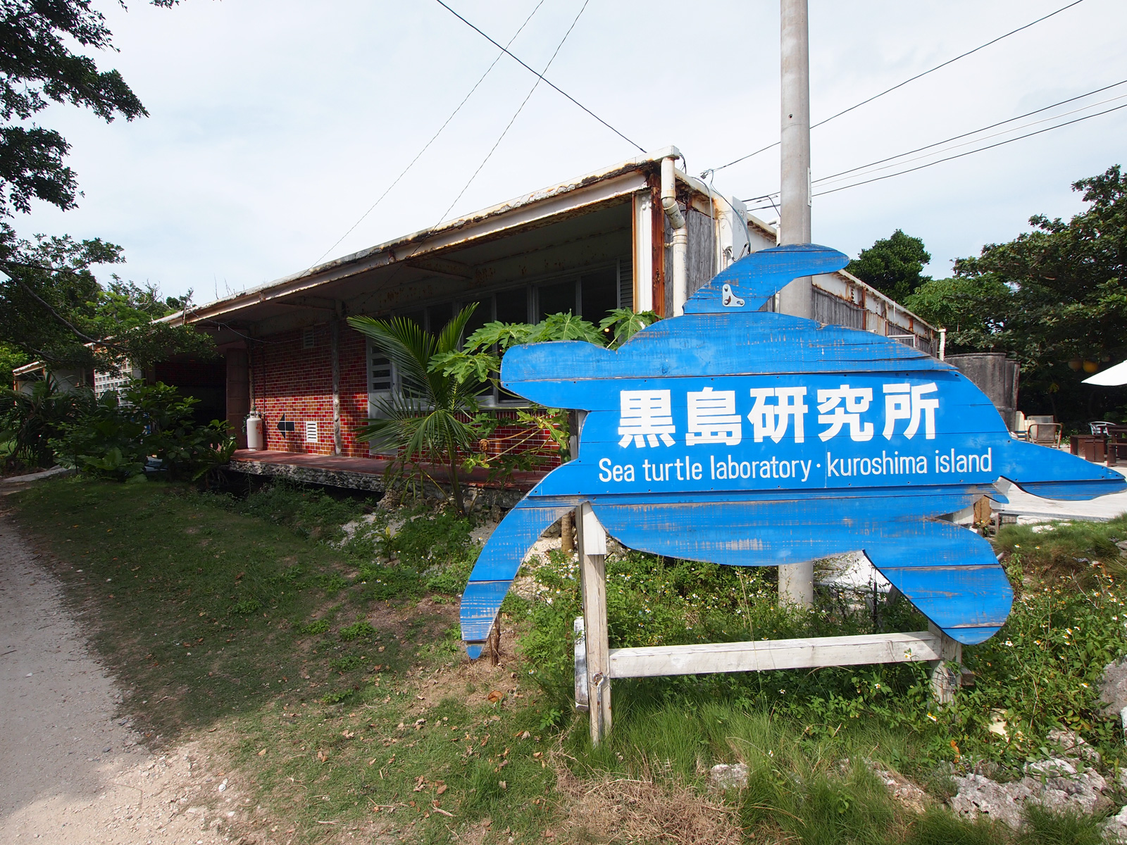 黒島研究所（沖縄県竹富町黒島）